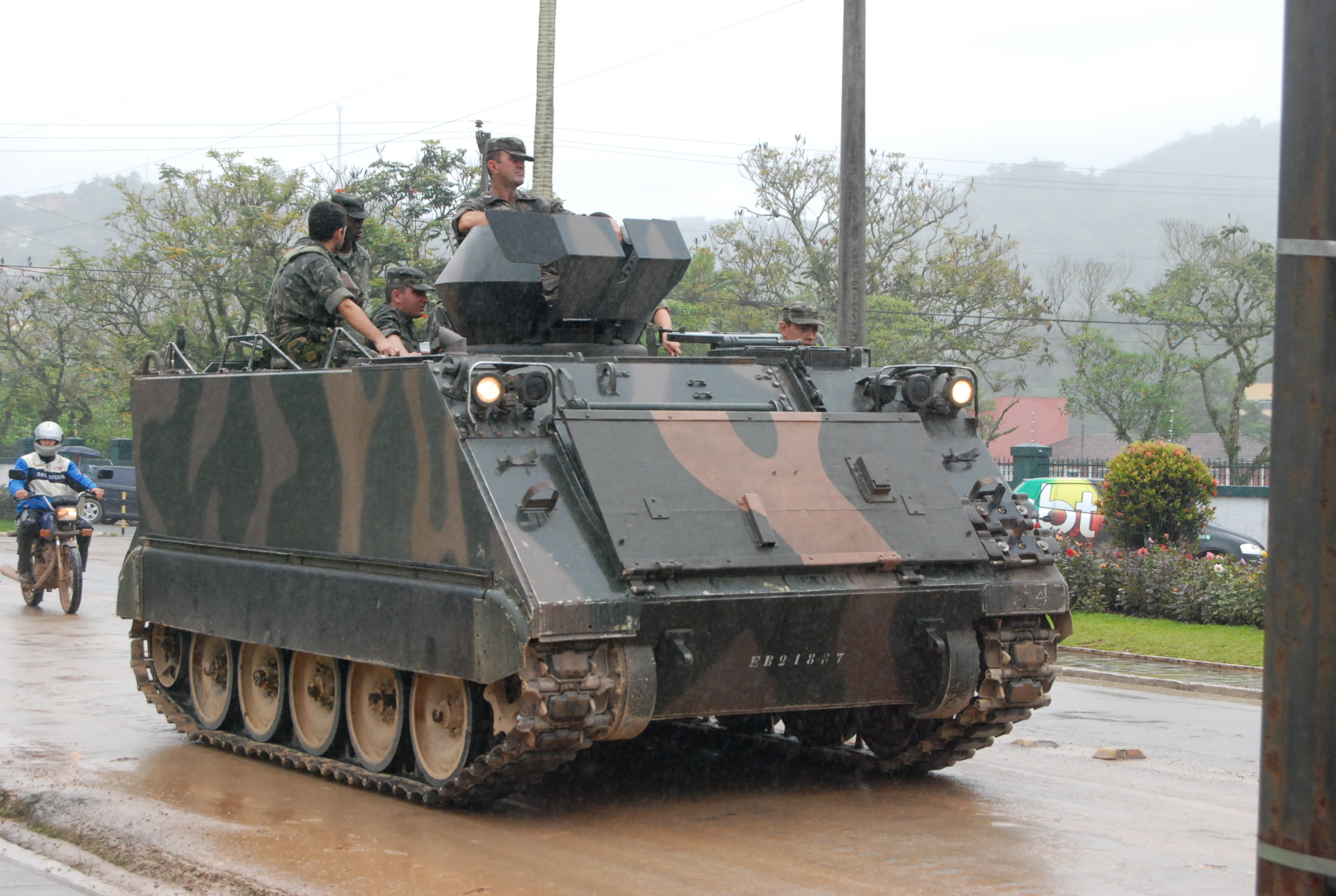 Vehículo M113 de transporte de tropas del Ejército brasileño